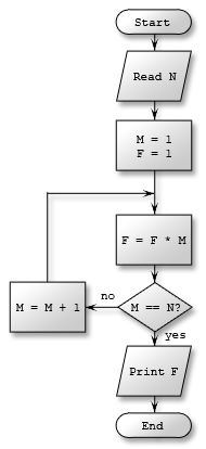 Пример блок-схемы - нахождение факториала числа N